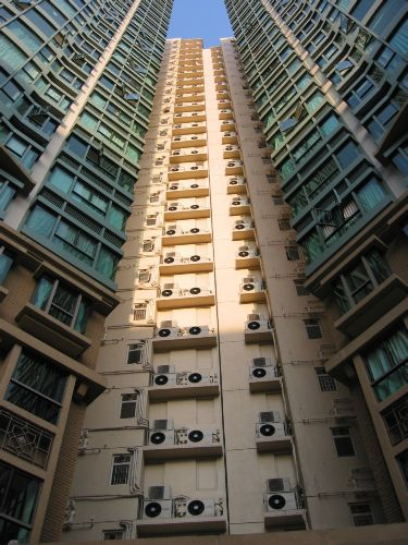 Klimaanlagen (Splitgeräte) in Hongkong